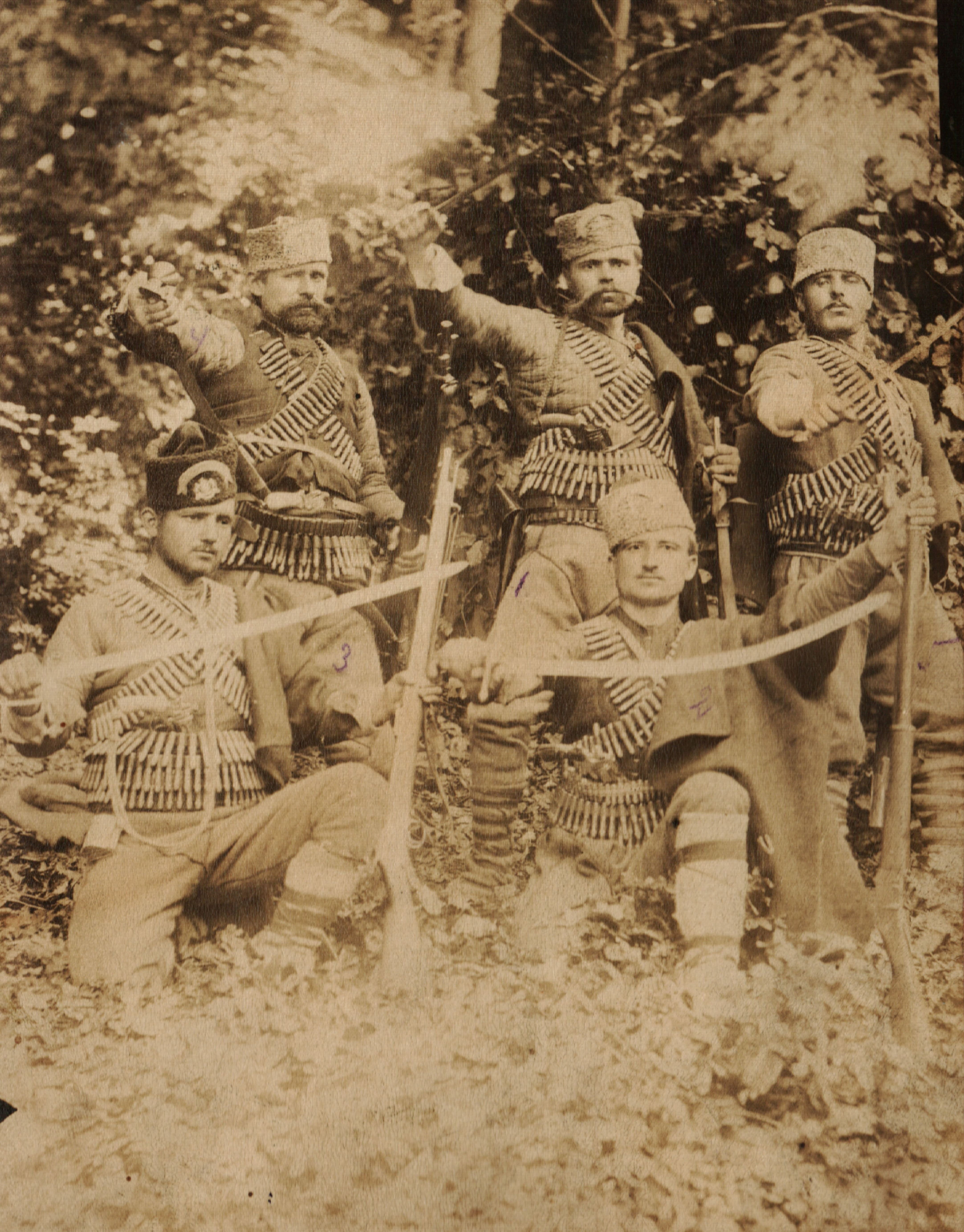 Снимка на четници на Кръсто Кебебчията.